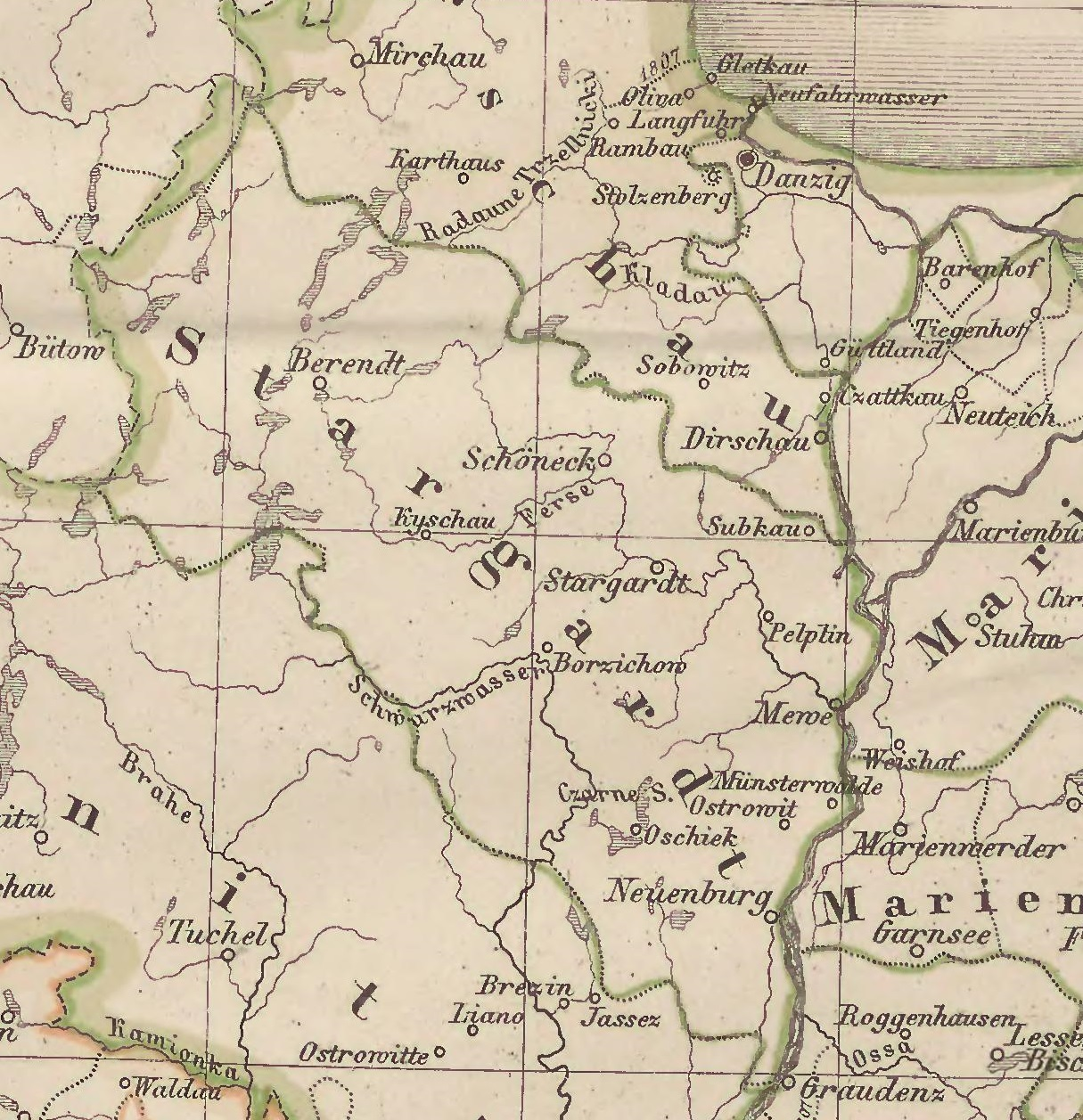 Kreis Marienburg von 1772 bis 1818